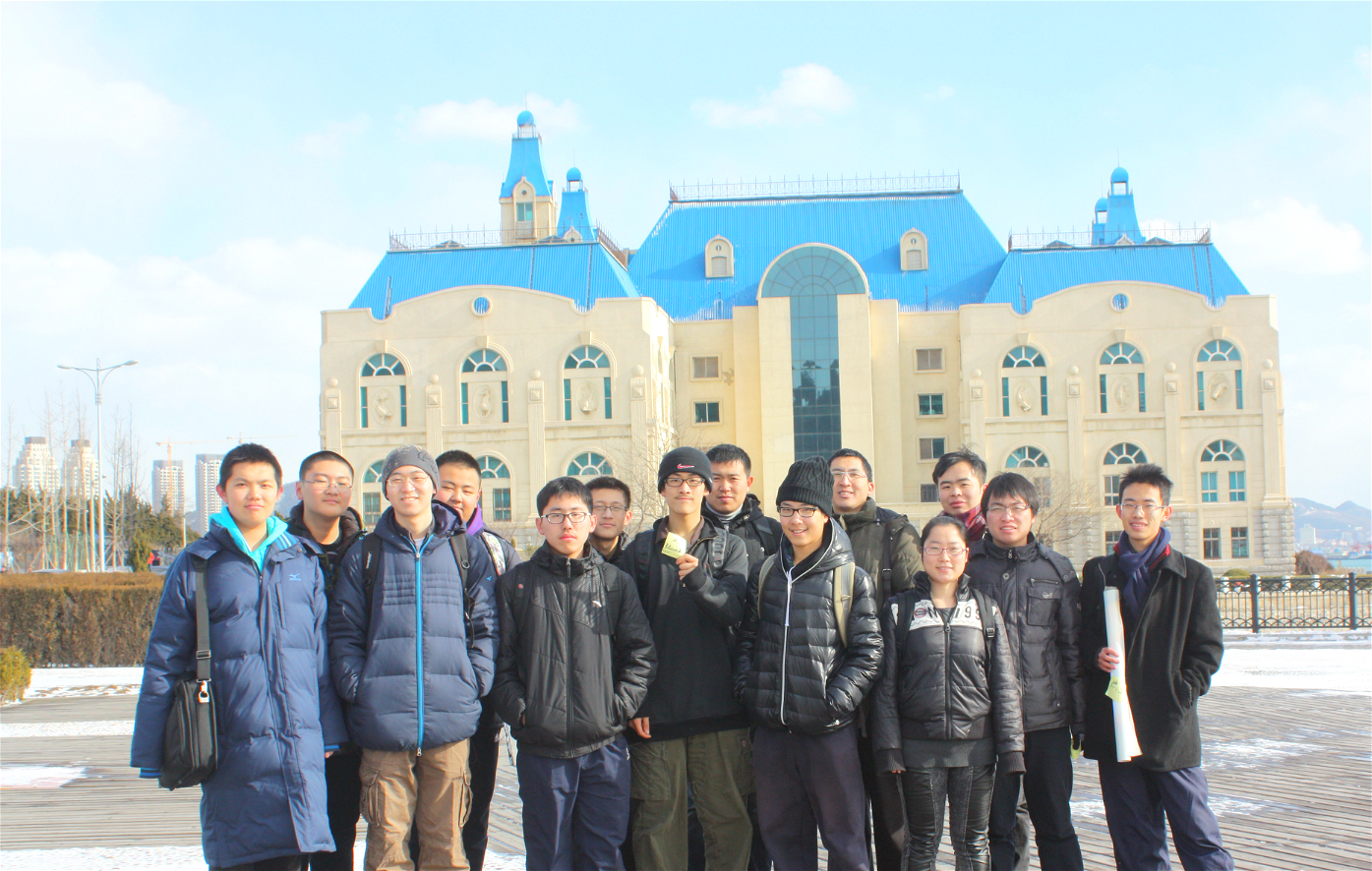 维基百科，维基人2012年12月30日大连冬聚集体照，自然博物馆前。